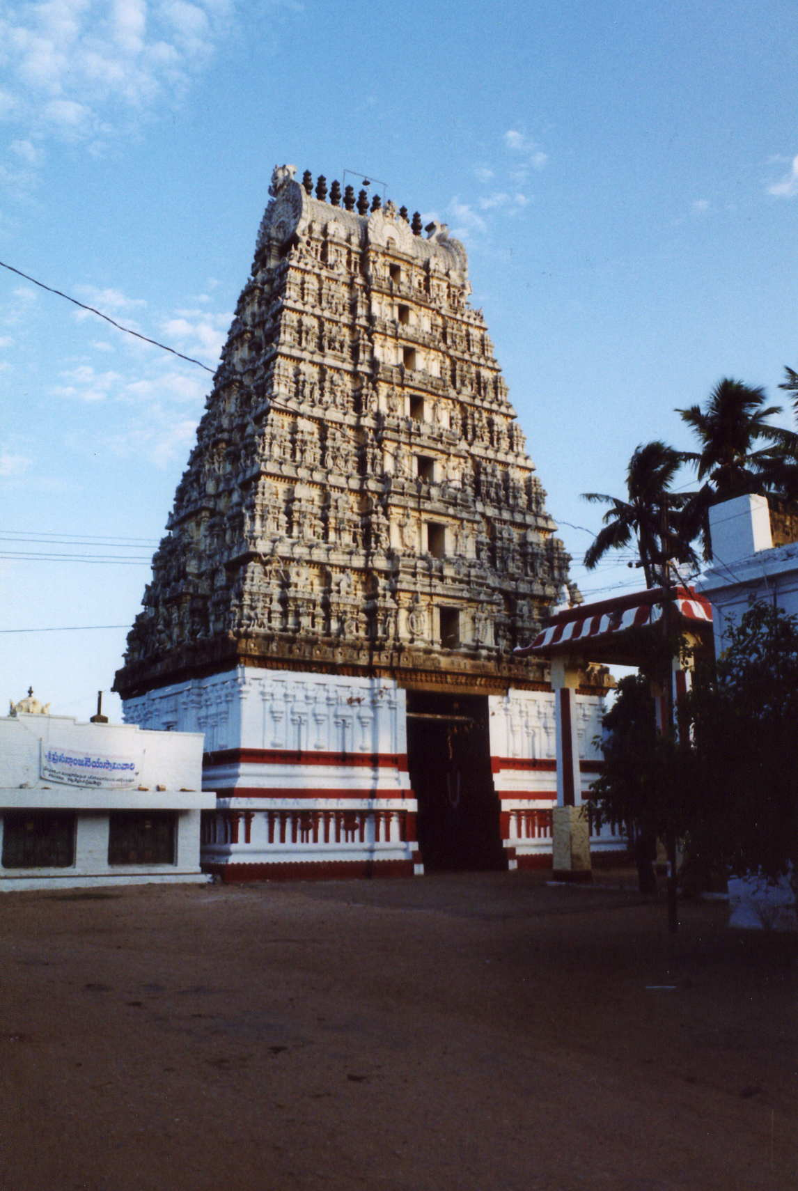 Kodandaram Ramaswamy Temple at Buchireddypalem